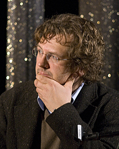 Andreas Fröhlich in Marburg